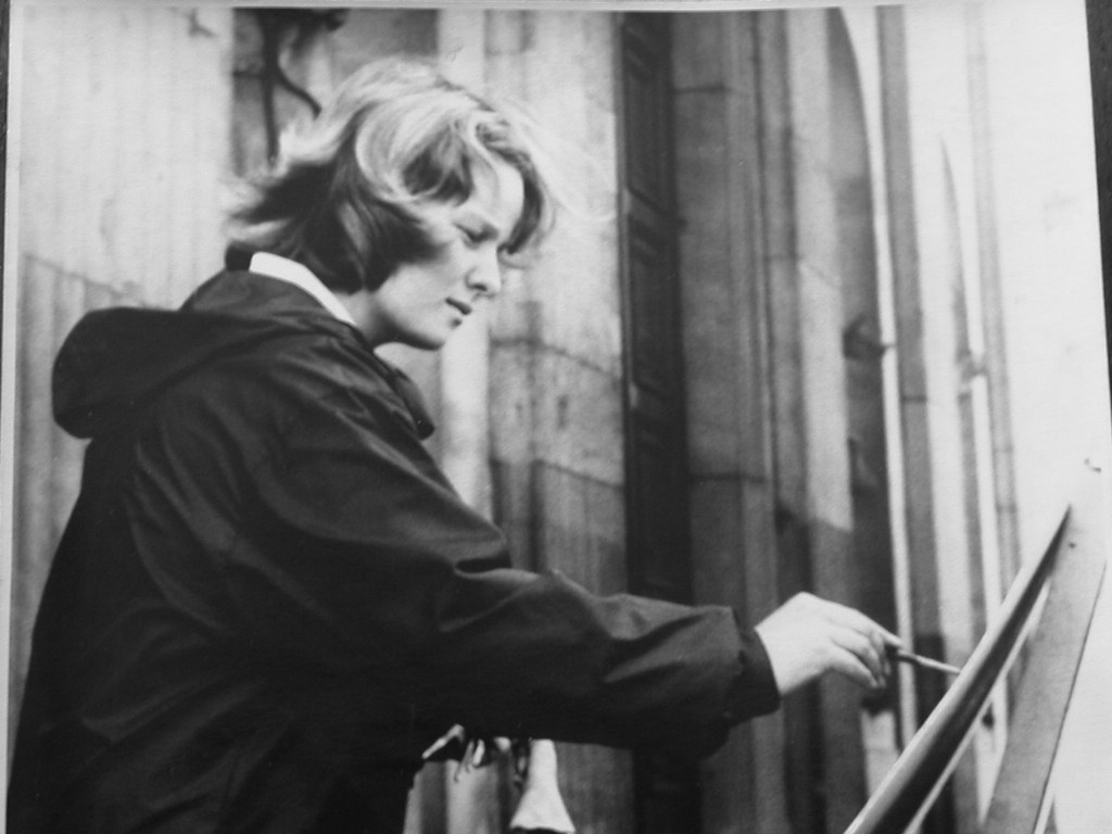 Die Malerin und Grafikerin Annemarie Bauer in ihrem Atelier, Mitte der 70er Jahre